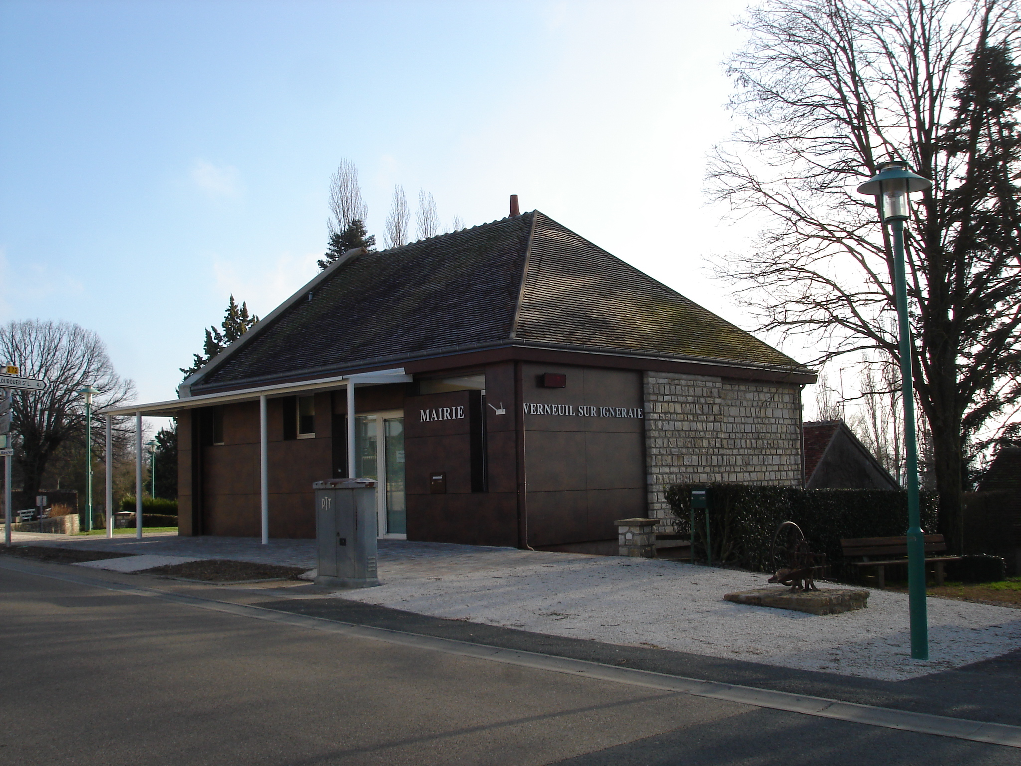 Verneuil-sur-Igneraie (36) : La mairie.